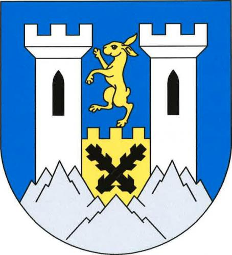 Znak, Klapý, okres Litoměřice